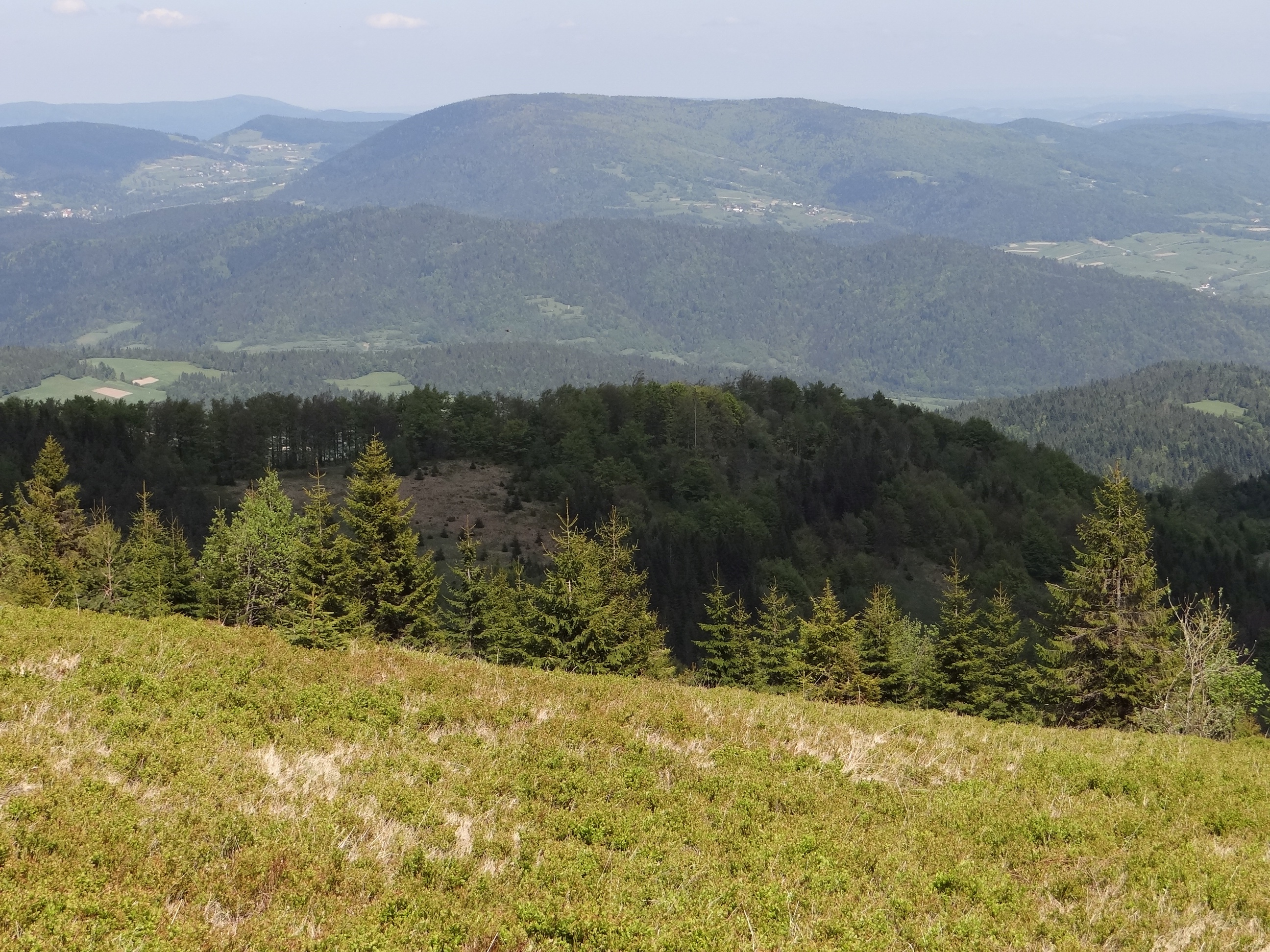 Widok z polany Tokarka na Modyń i Zbludzkie Wierchy